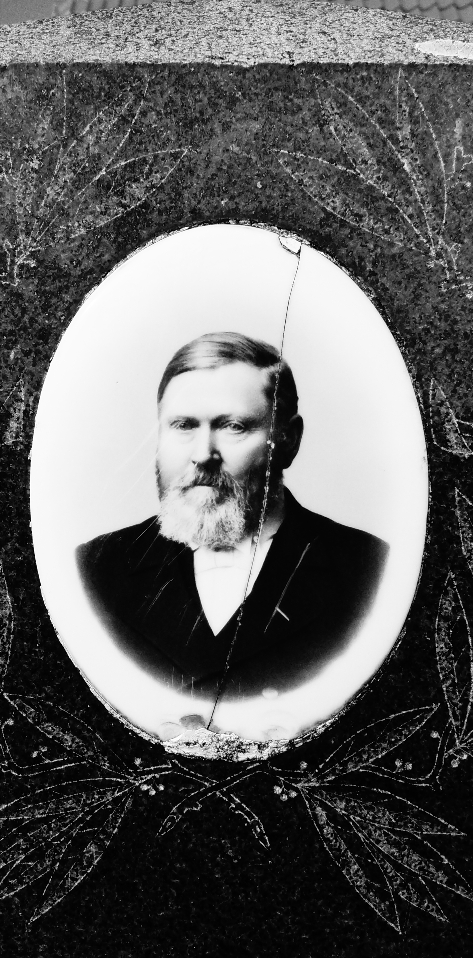 Rolsø Kapel, Gravsten 3